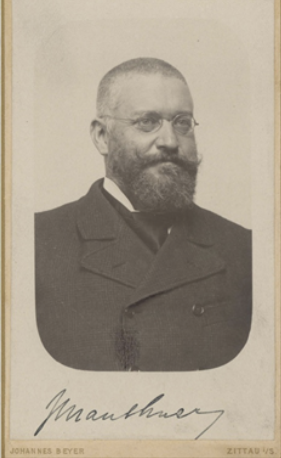 Portrait; österreichischer Chemiker (Biochemie, medizinische Chemie) und Mediziner.